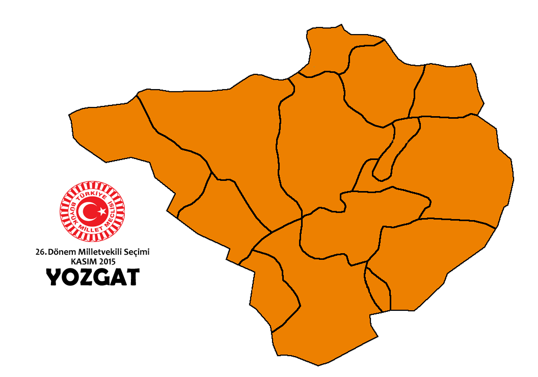 Kasım 2015 Seçimleri